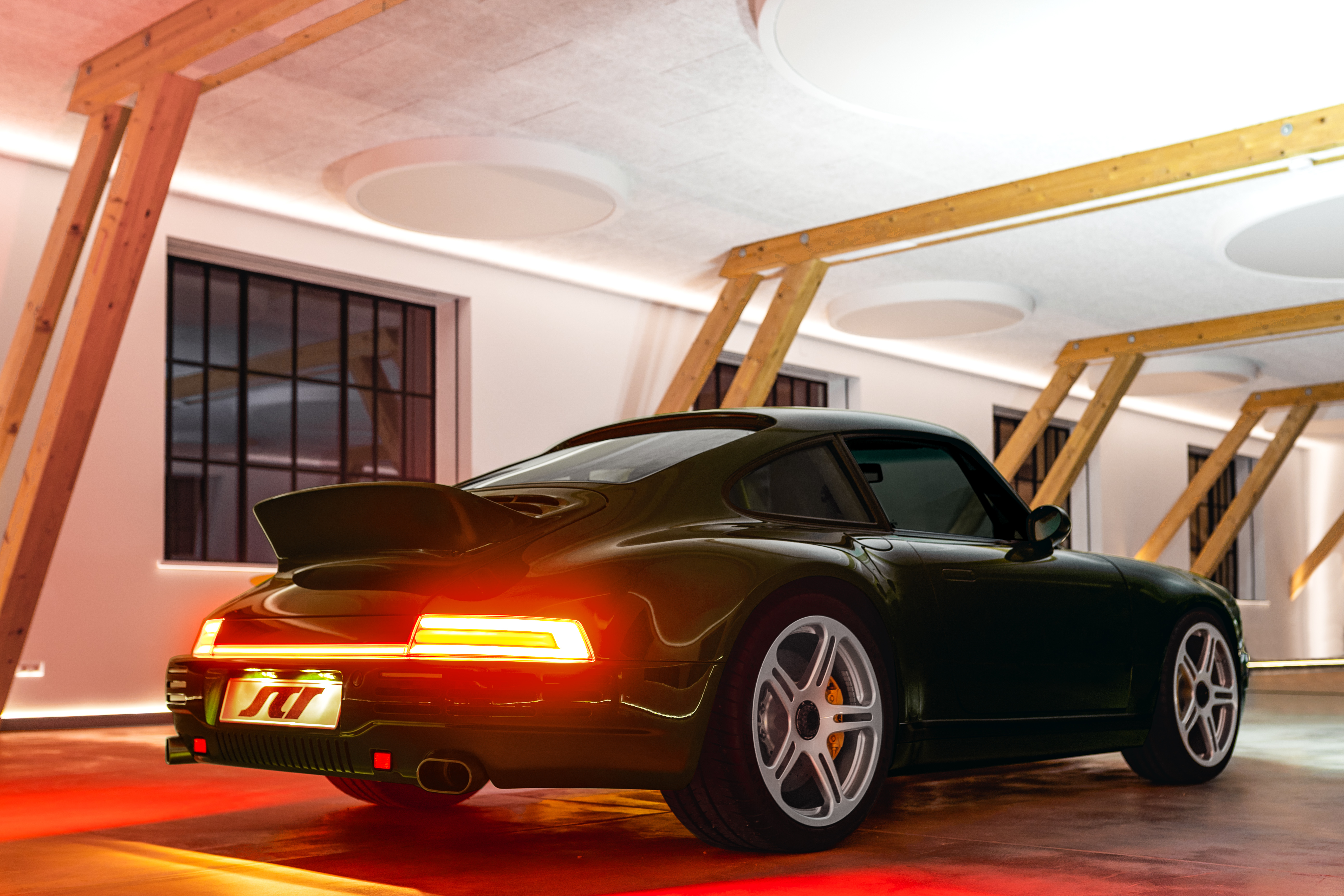 2020 RUF SCR